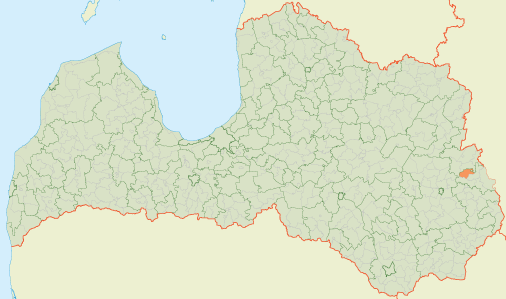 Пушмуцовская волость на карте Латвии